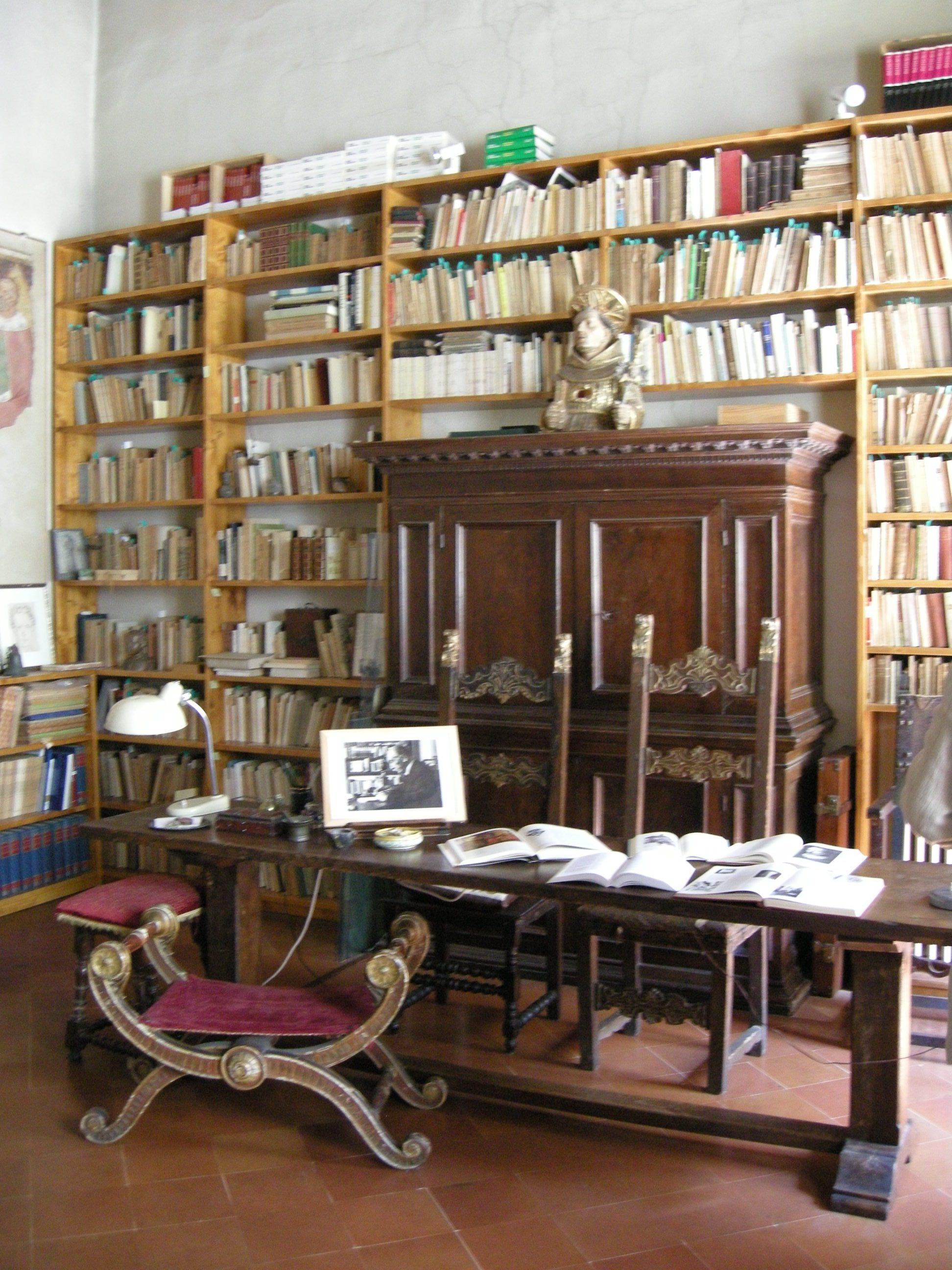 Palazzo bargellini, interno, sala 2